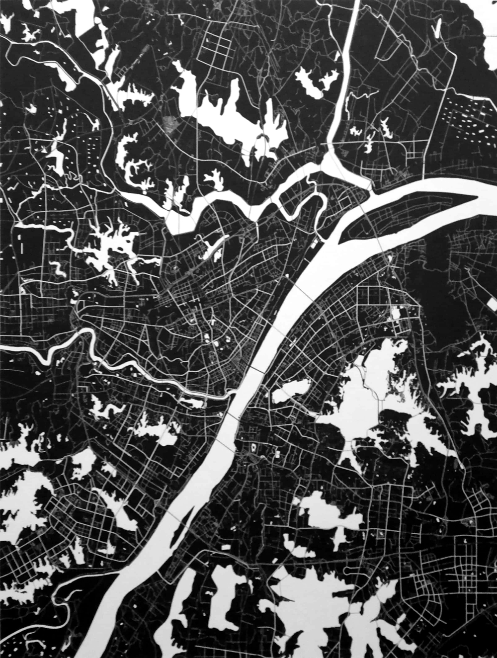 the lakes and roads of wuhan